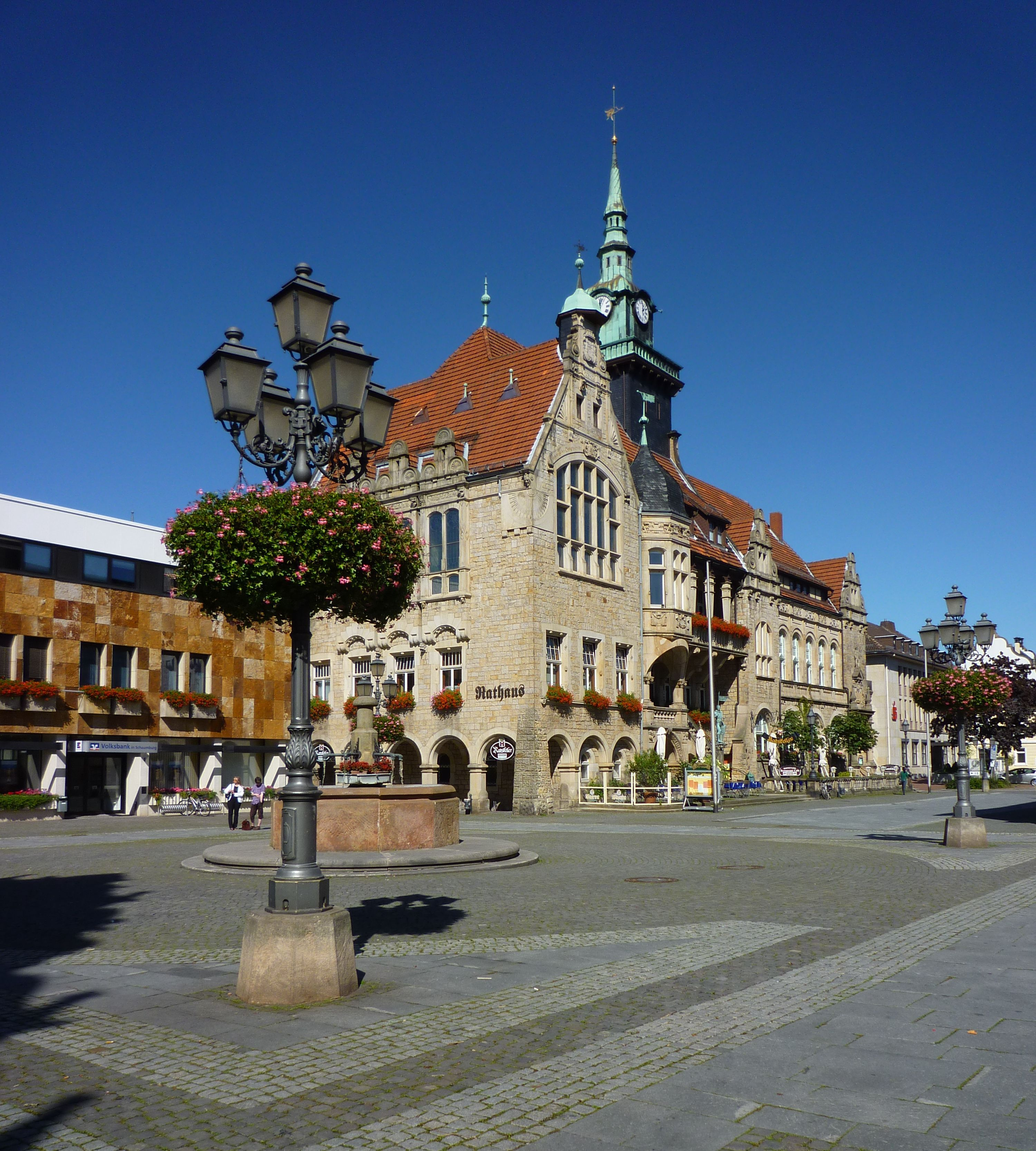 Bückeburg - Rathaus